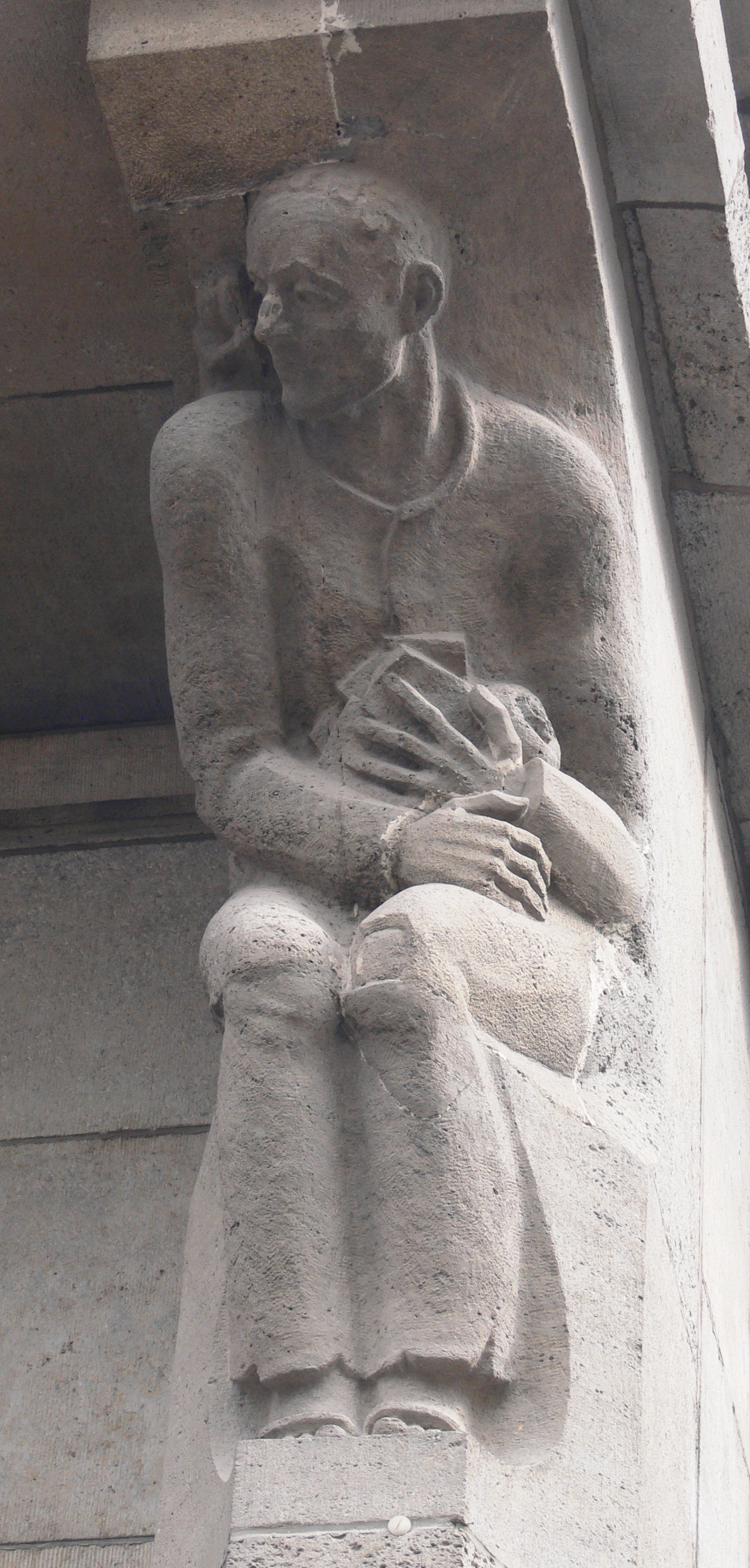 Erfurt, Sparkasse am Fischmarkt (1934/1935) Reliefgestaltung zum Thema "Die Laster und die Tugenden" von Hans Walther Das Laster Geiz